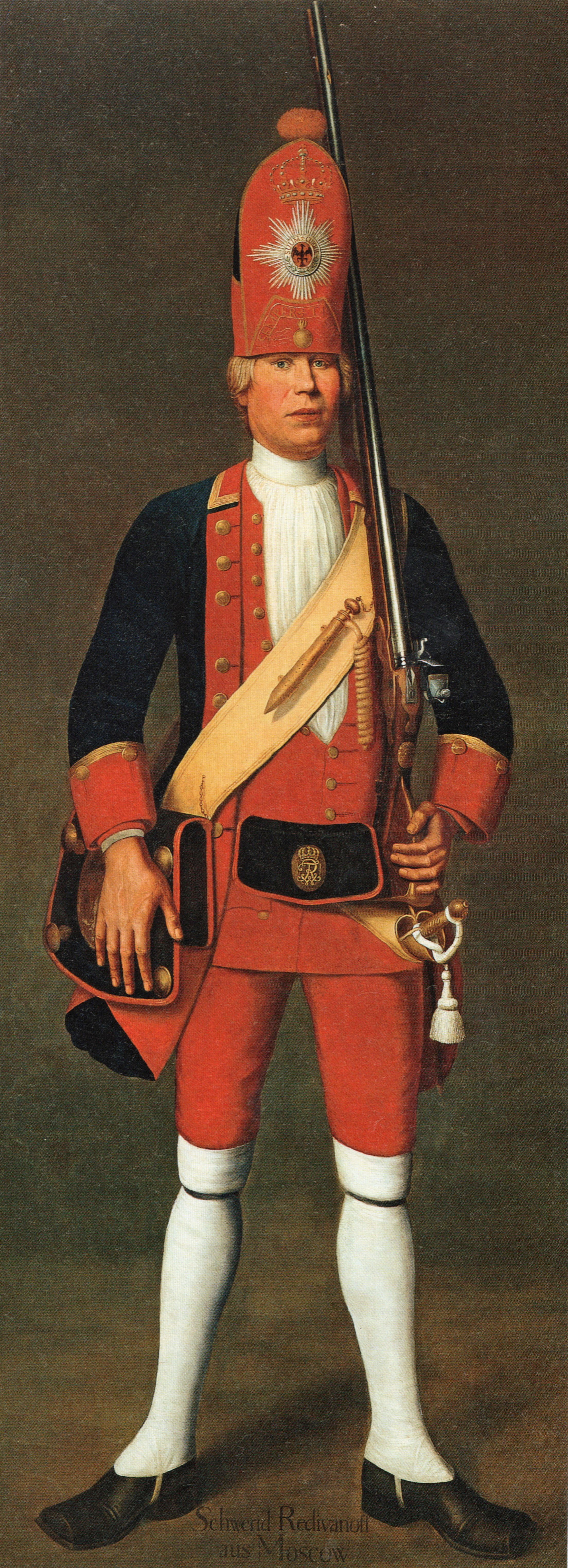 Langer Kerl (Rotes Leibbataillon] der Riesengarde Friedrich Wilhelms I.: Grenadier Schwerid Rediwanoff aus Moskau. Rdiwanoff soll (laut Bildbeschreibung DHM) zu den Männern gehört haben, die Peter der Große im Geschenkaustausch gegen das Bernsteinzimmer nach Berlin schickte